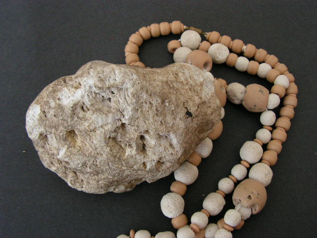 pumeks i korale z pumeksu,pochodzenia Grecja; okazy ze zbiorów własnych